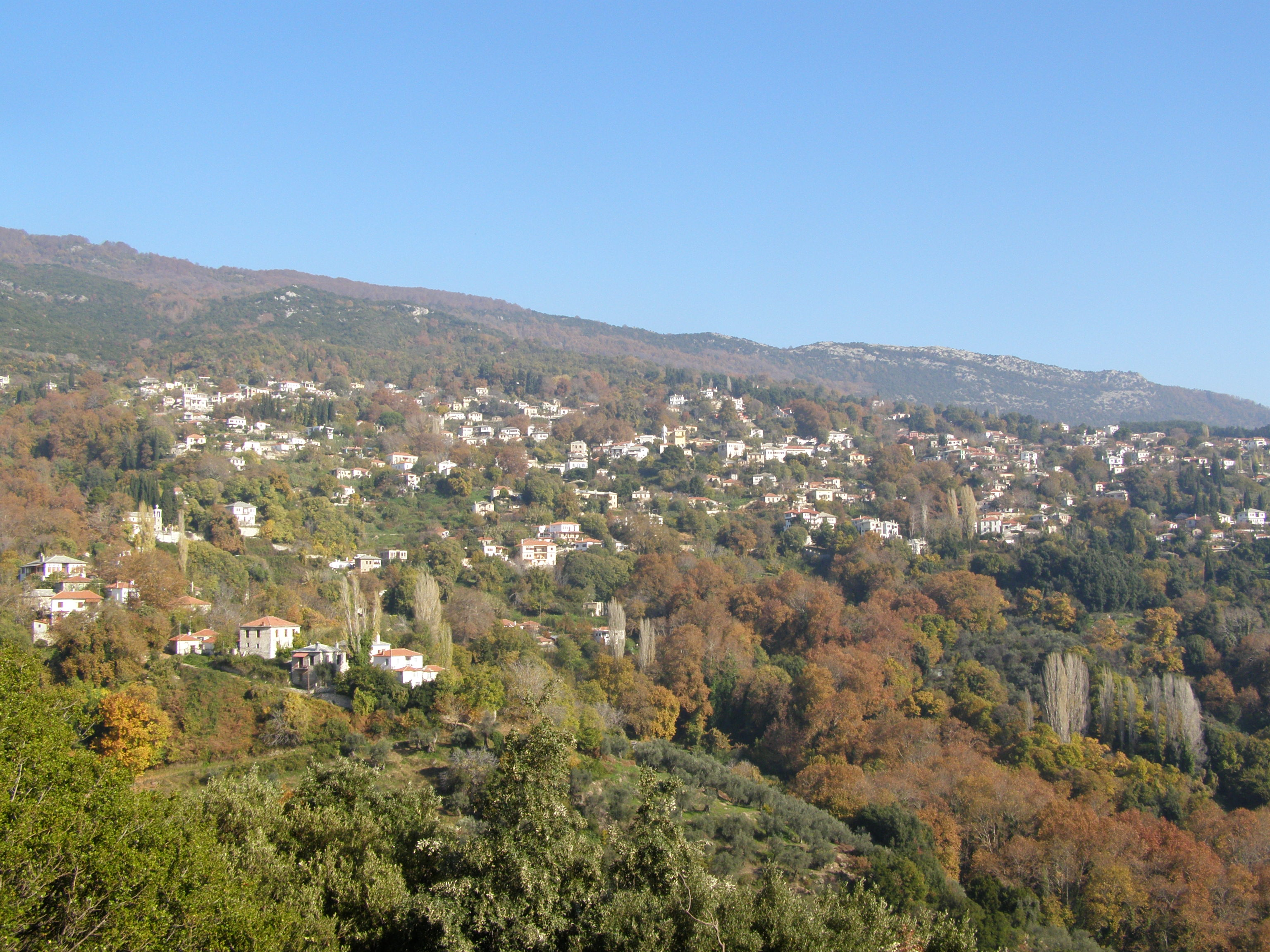 Το χωριό Μηλιές στο Πήλιο.